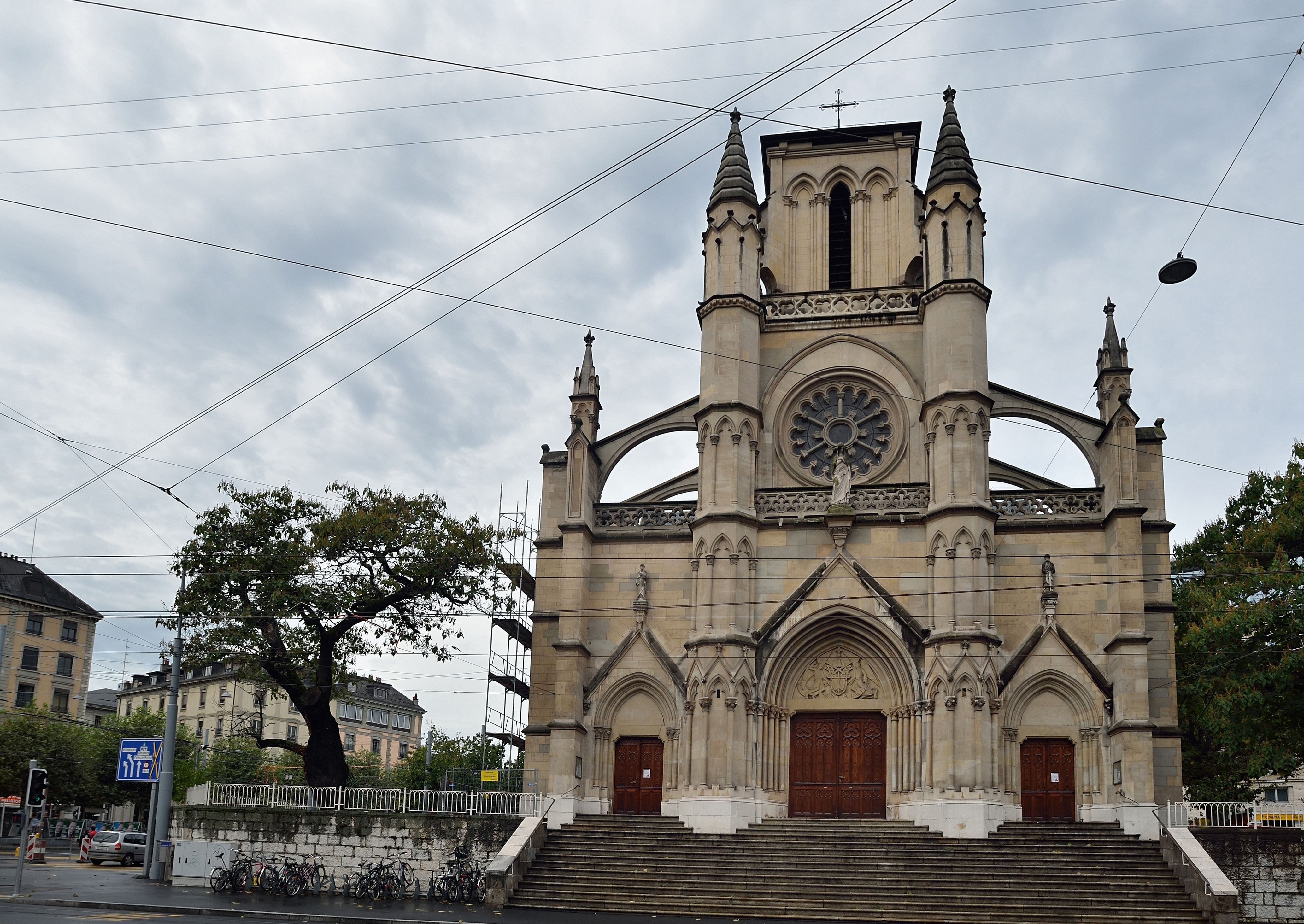 Basilique Notre-Dame (Genève, Suisse)